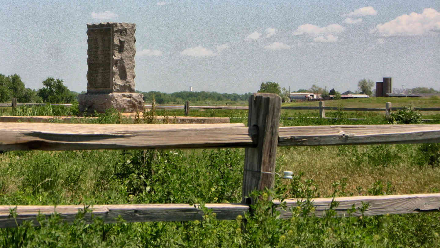 Marker for Old Fort St. Vrain